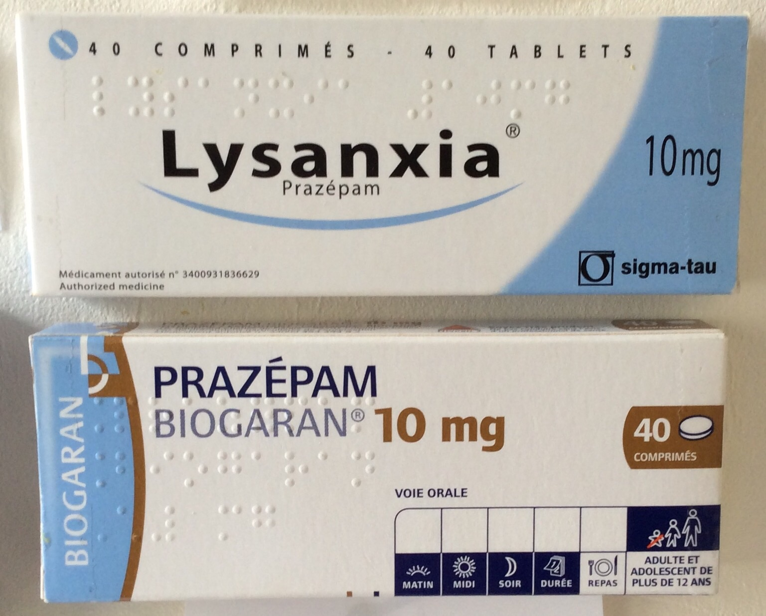 Boite de Lysanxia et boite de Prazépam